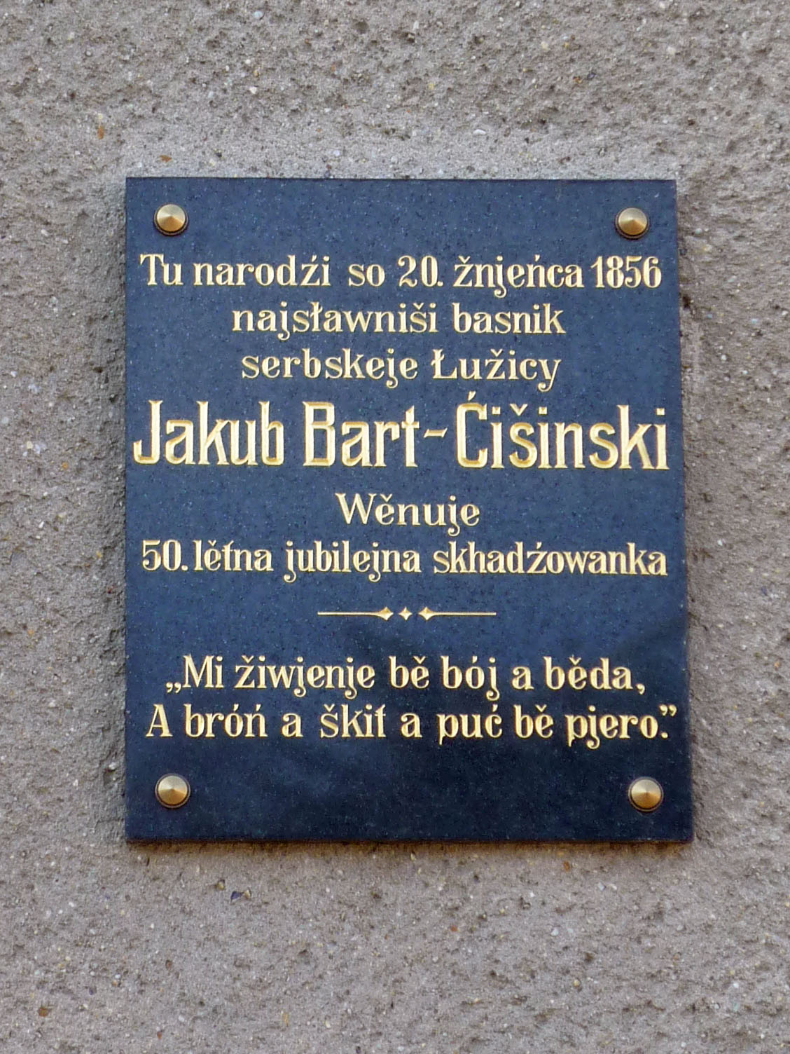 Tafel am Geburtshaus von Jakub Bart-Ćišinski (1856–1909), sorbischer Dichter, in Panschwitz-Kuckau, Crostwitzer Str. Hornjoserbsce: Wopomnjenska taflička při ródnym domje Jakuba Barta-Ćišinskeho w Kukowje.